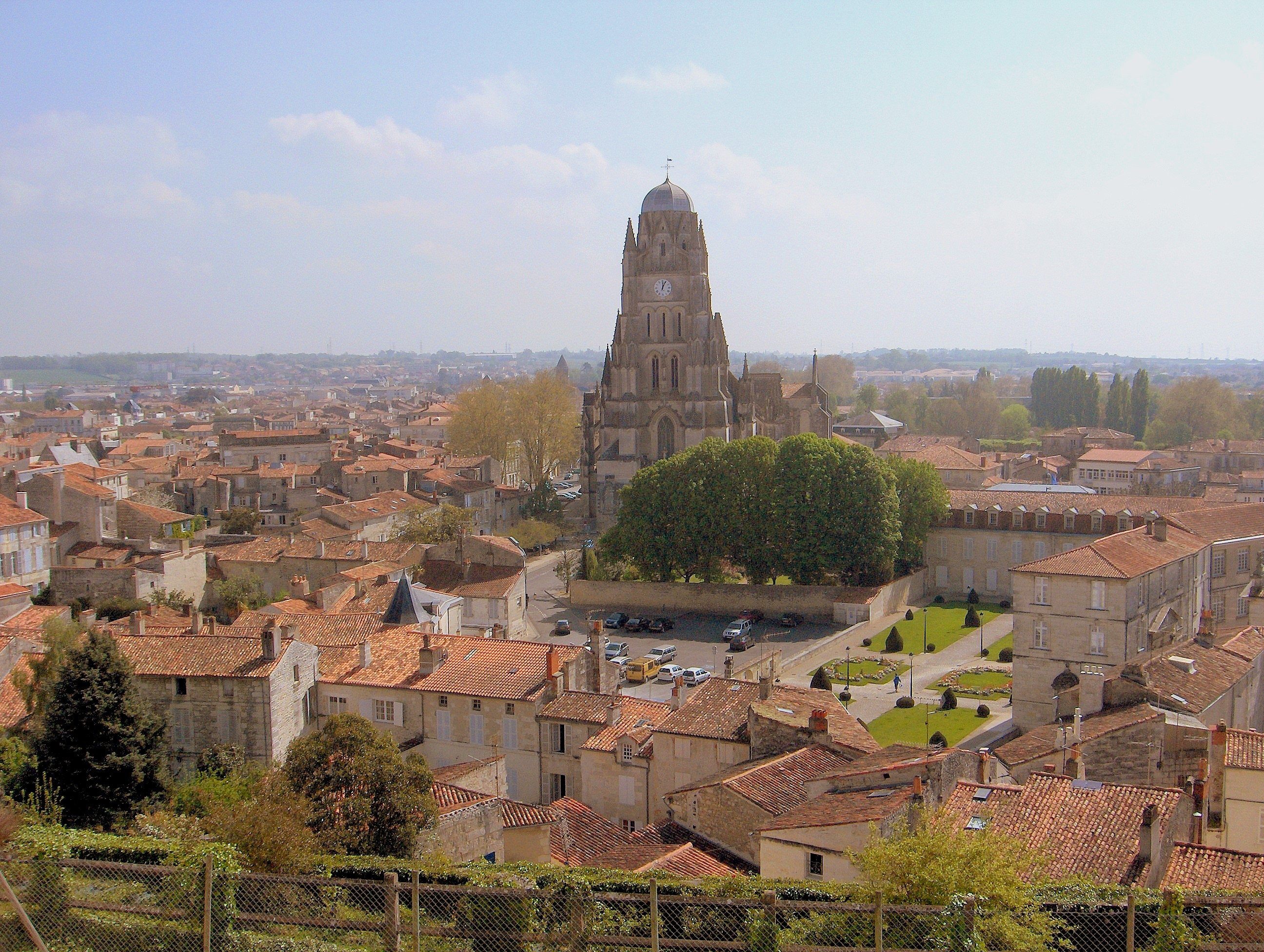 Panorama sur la vieille ville de Saintes et la cathédrale Saint-Pierre